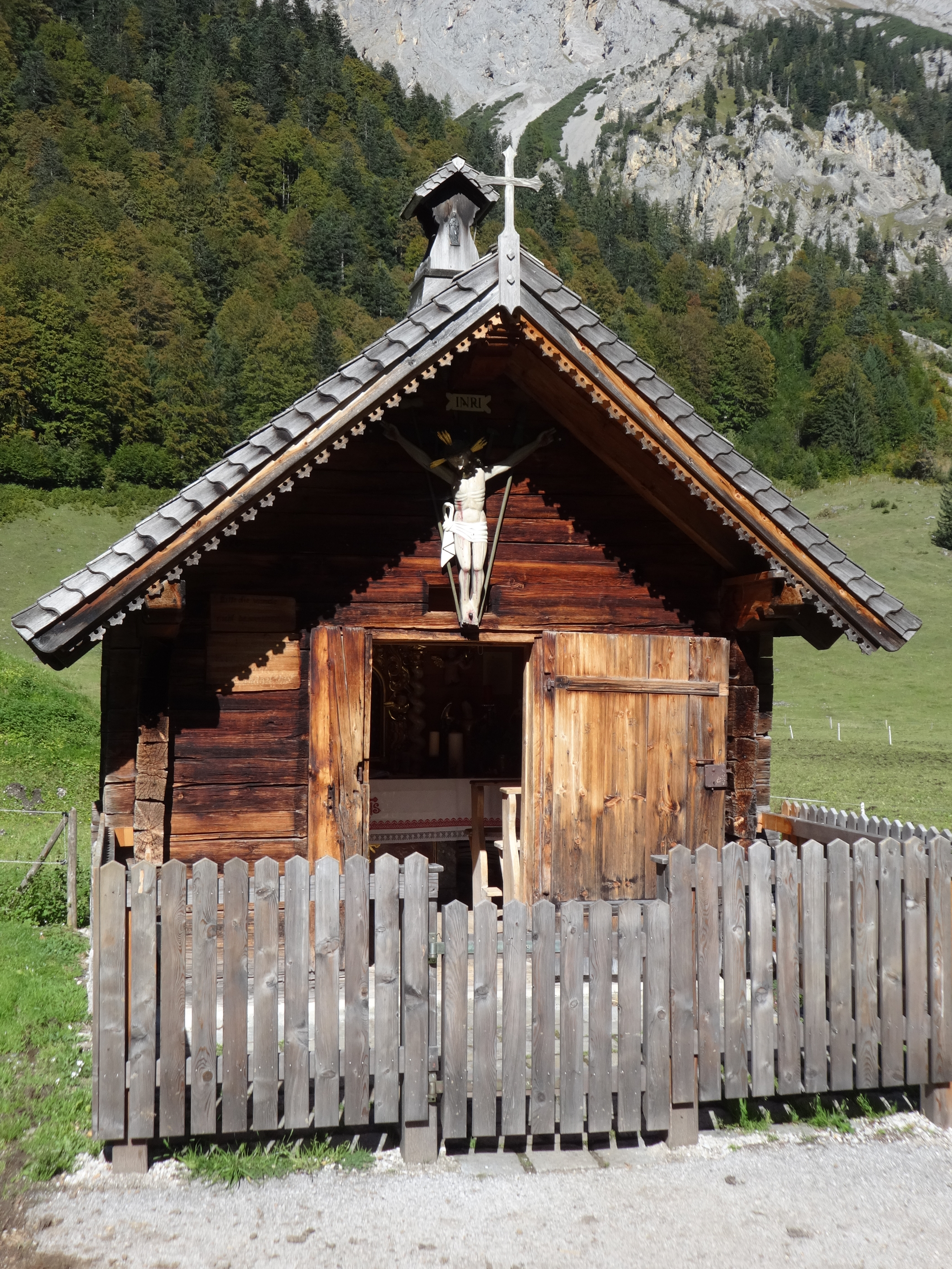 Walburga-Kapelle bei der Engalm This media shows the remarkable cultural object in the Austrian state of Tyrol listed by the Tyrolean Art Cadastre with the ID 116456. (on tirisMaps, pdf, more images on Commons, Wikidata)